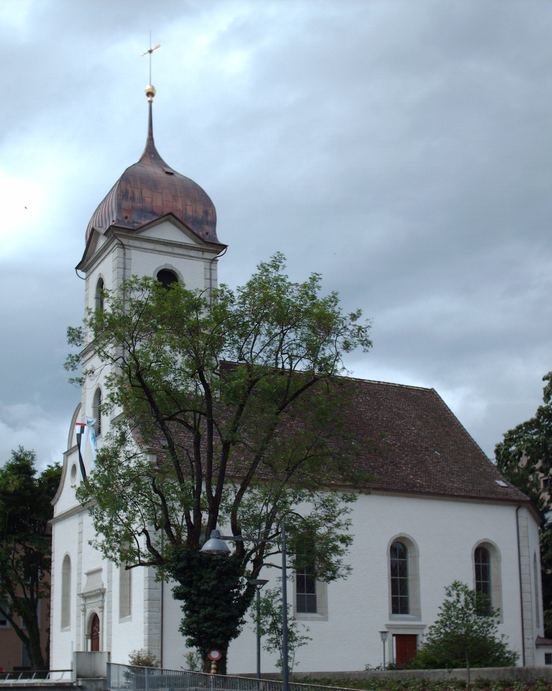 Reformierte Kirche Baden, von Nordosten